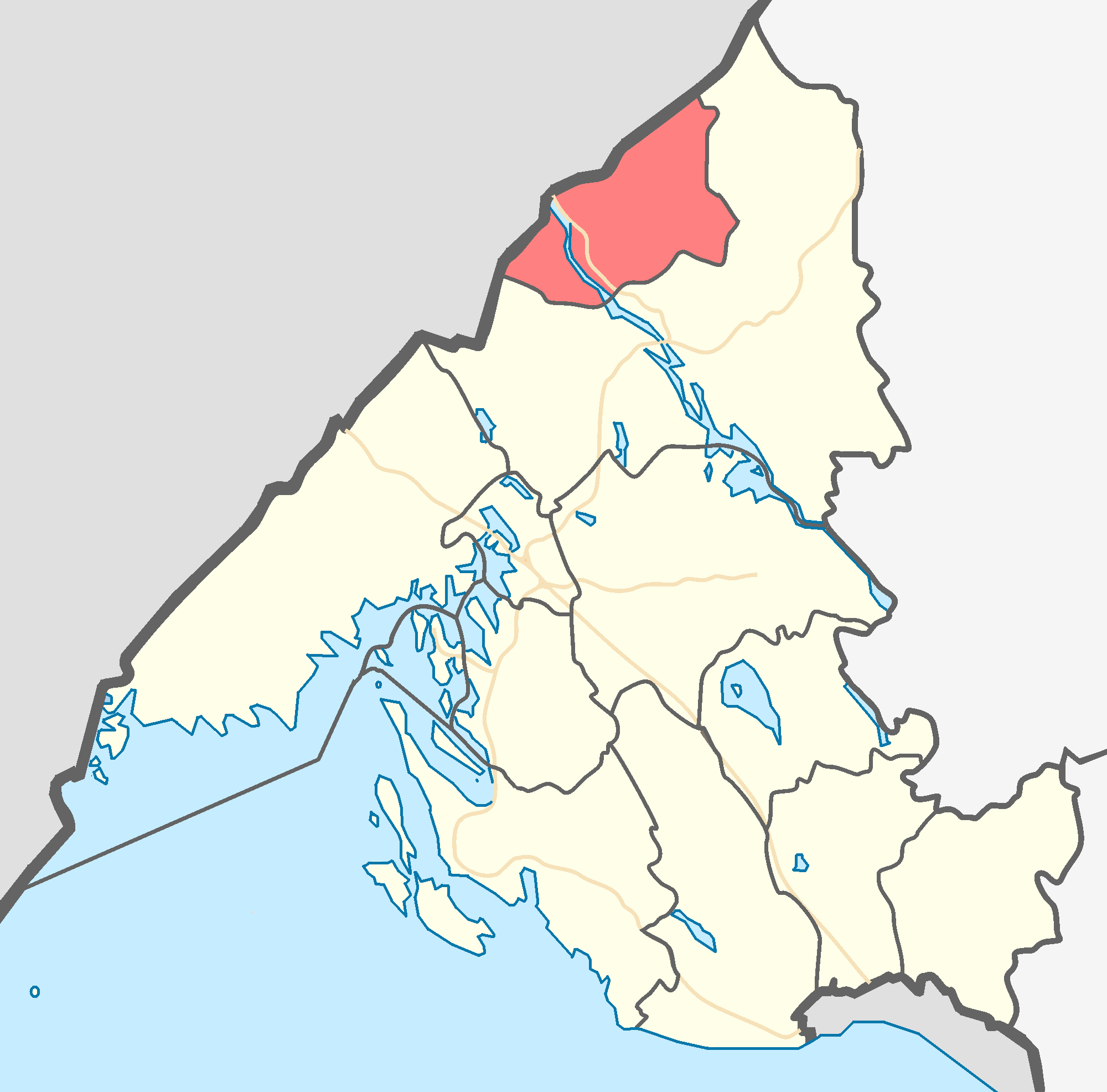 МО Светогорское городское поселение на карте Выборгского района Ленинградской области